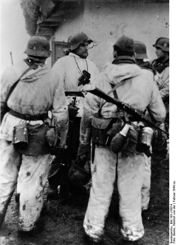 Russland, Besprechnug vor Angriff Scherl Bilderdienst Füsiliere der Panzergrenadier-Division"Gross-Deutschland" haben sich im Bereitstellungsort eingefunden und erwarten den Einsatzbefehl. Unterdessen macht der Führer der Einheit seine Männer mit den Einzelheiten des Angriffs bekannt. PK-Aufnahme Kriegsberichter von der Becke 25.2.44 [Herausgabedatum] [Sowjetunion.- Infanteristen der Panzergrenadier-Division "Grossdeutschland" in Wintertarnbekleidung bei Besprechung]